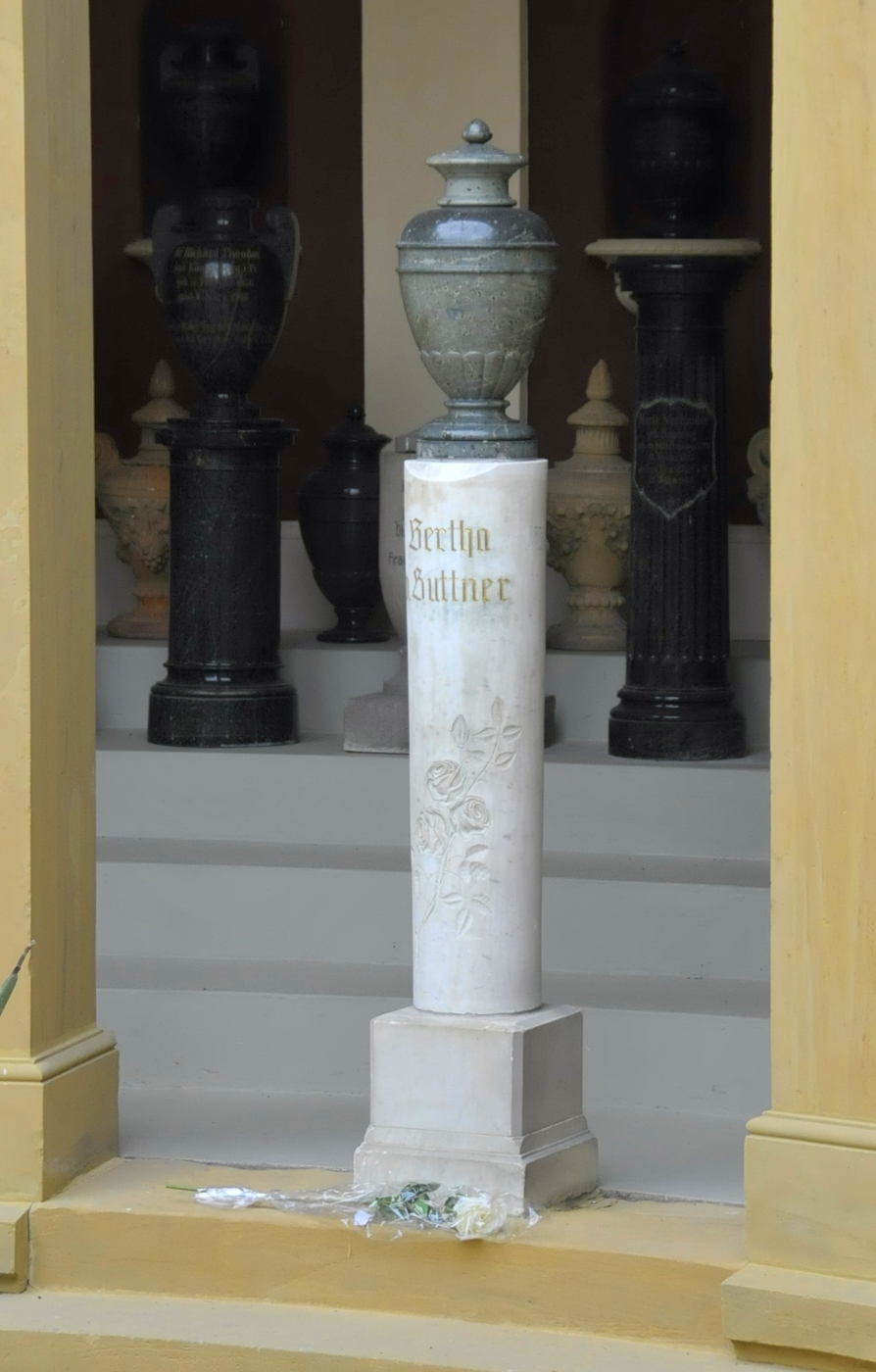 Urne der Berta von Suttner im Krematorium Gotha